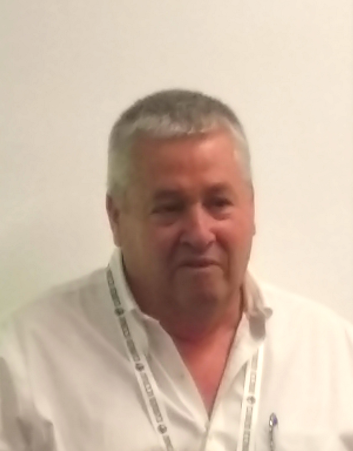 מודי בן ש"ך, איש עסקים ישראלי.